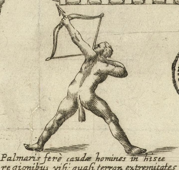 "Caudati homines hic", hombres con cola que el mapa de Alonso de Ovalle ubica en las regiones magallánicas.